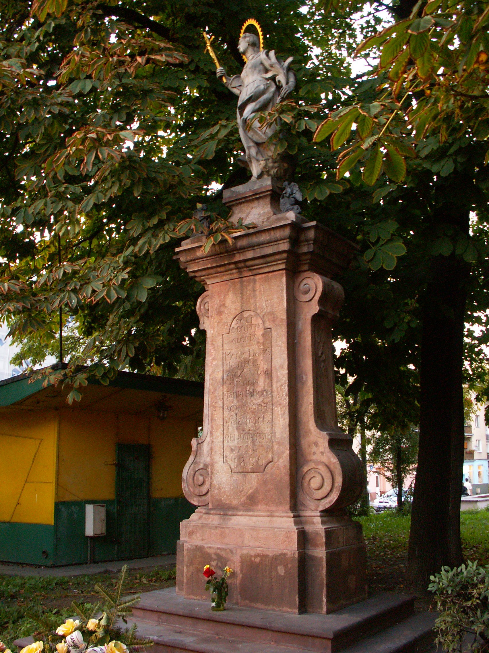 St. Tekla statue in Kielce (Poland)